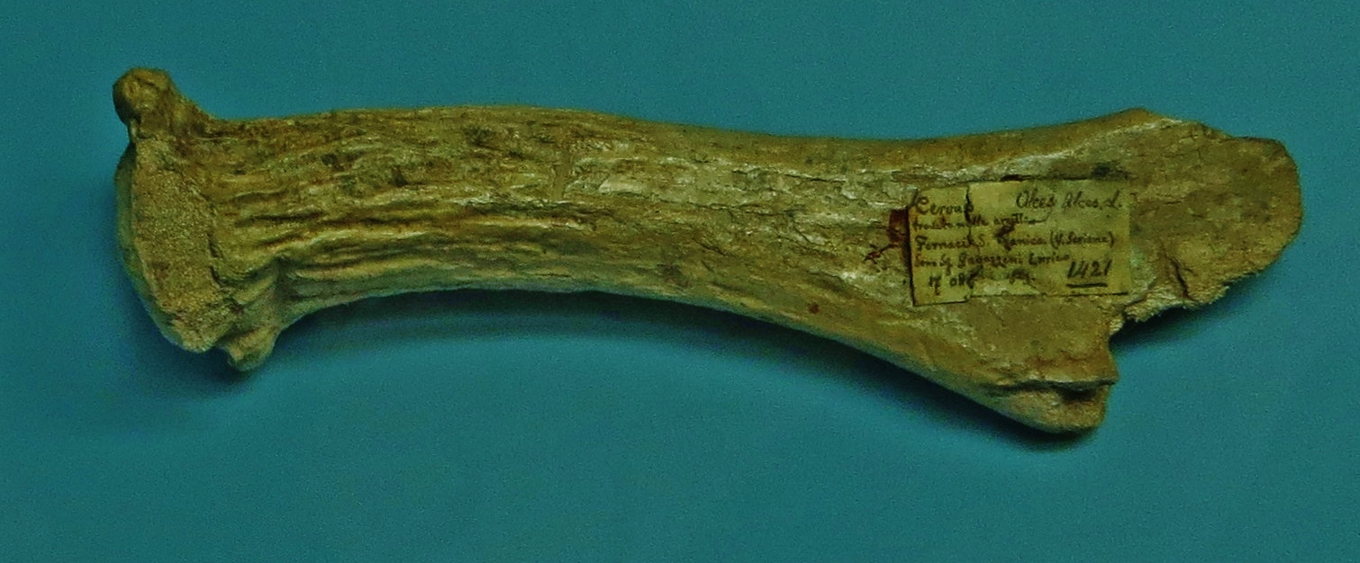 Fossil of Cervalces, an extinct mammal - Took the picture at Museo di Scienze Naturali di Bergamo